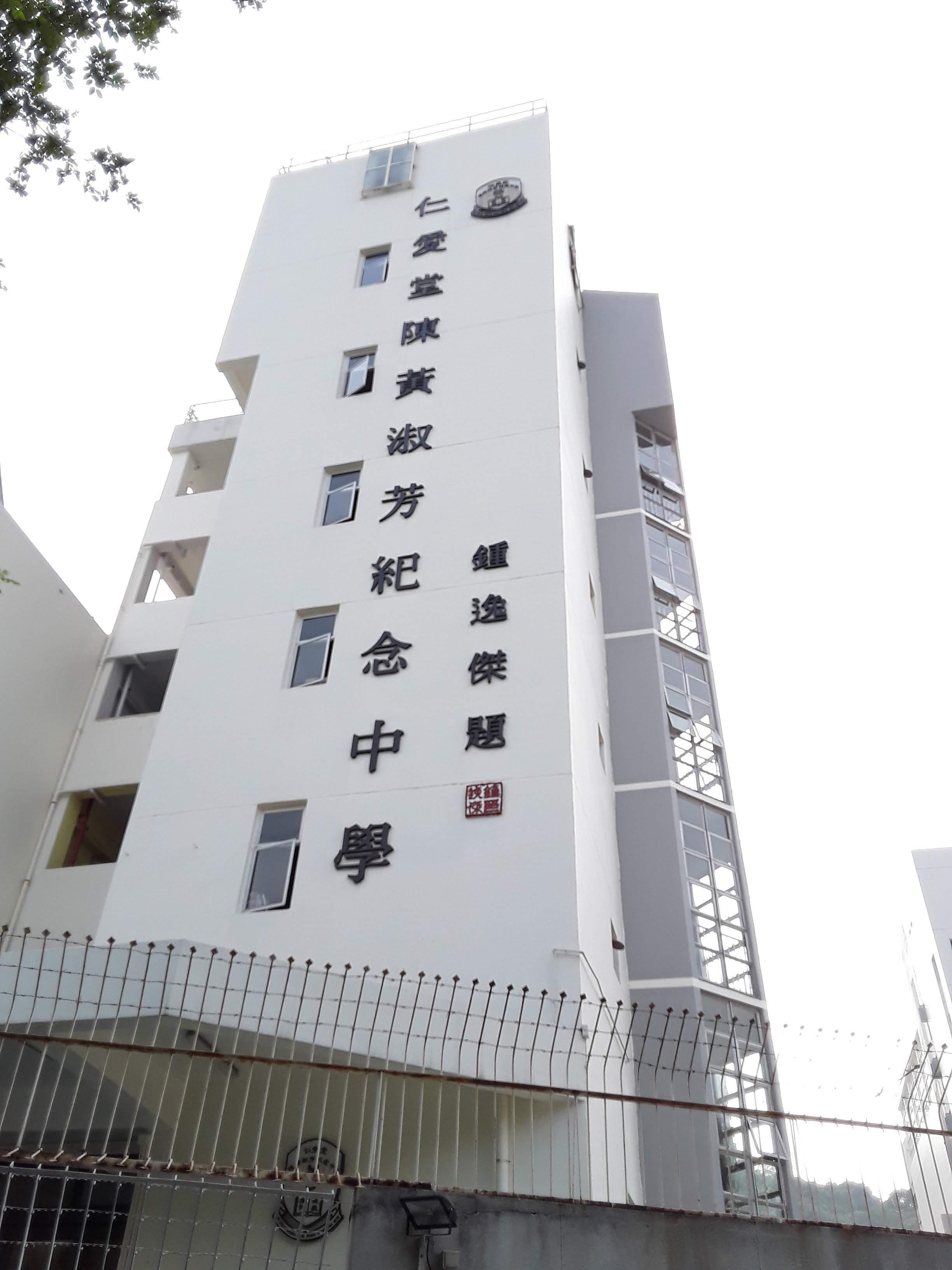 校舍正門入口校名